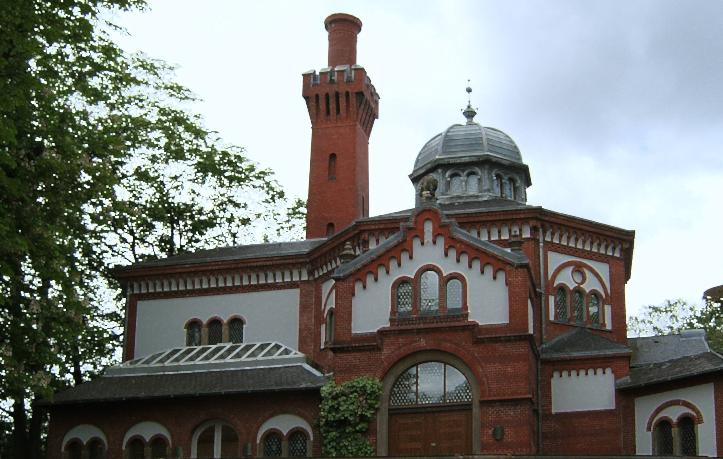 Altes Krematorium in Alsterdorf This is the photograph of an architectural monument. It is part of the list of cultural monuments of Hamburg, no. 623